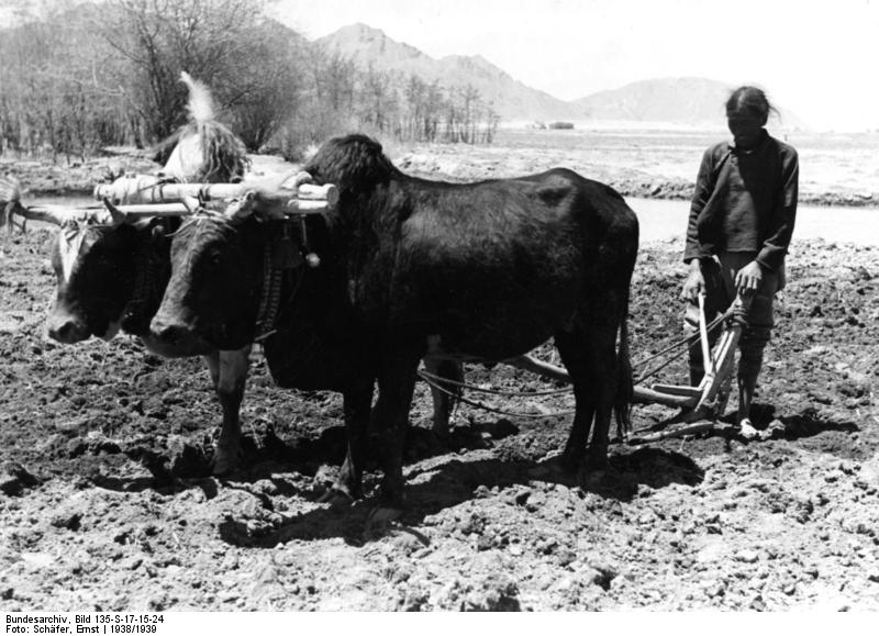 Schigatse-Taktse, pflügende Bauern